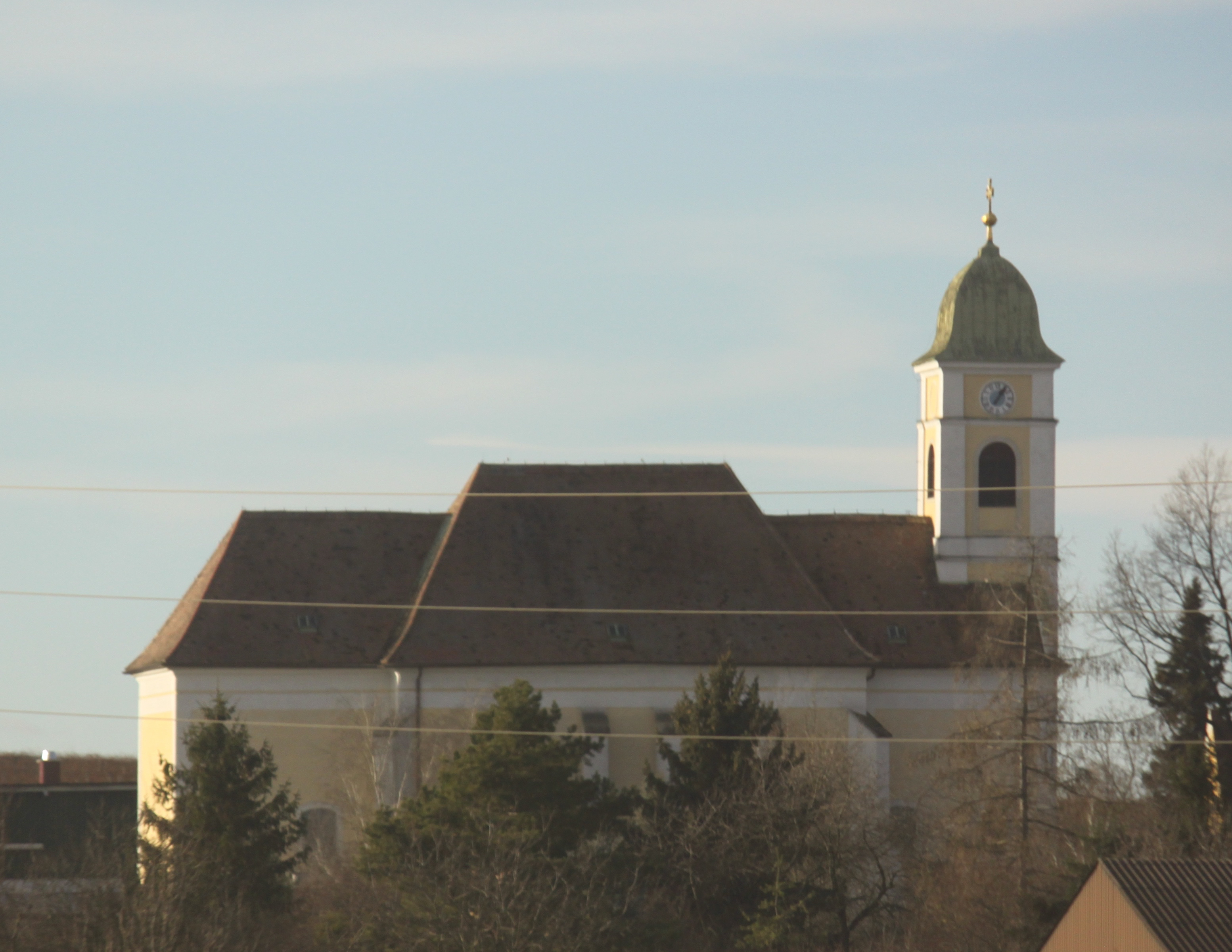 katholische Pfarrkirche heilige Kreuzerhöhung